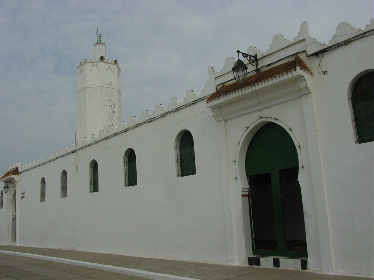 Mesquita em Asilah